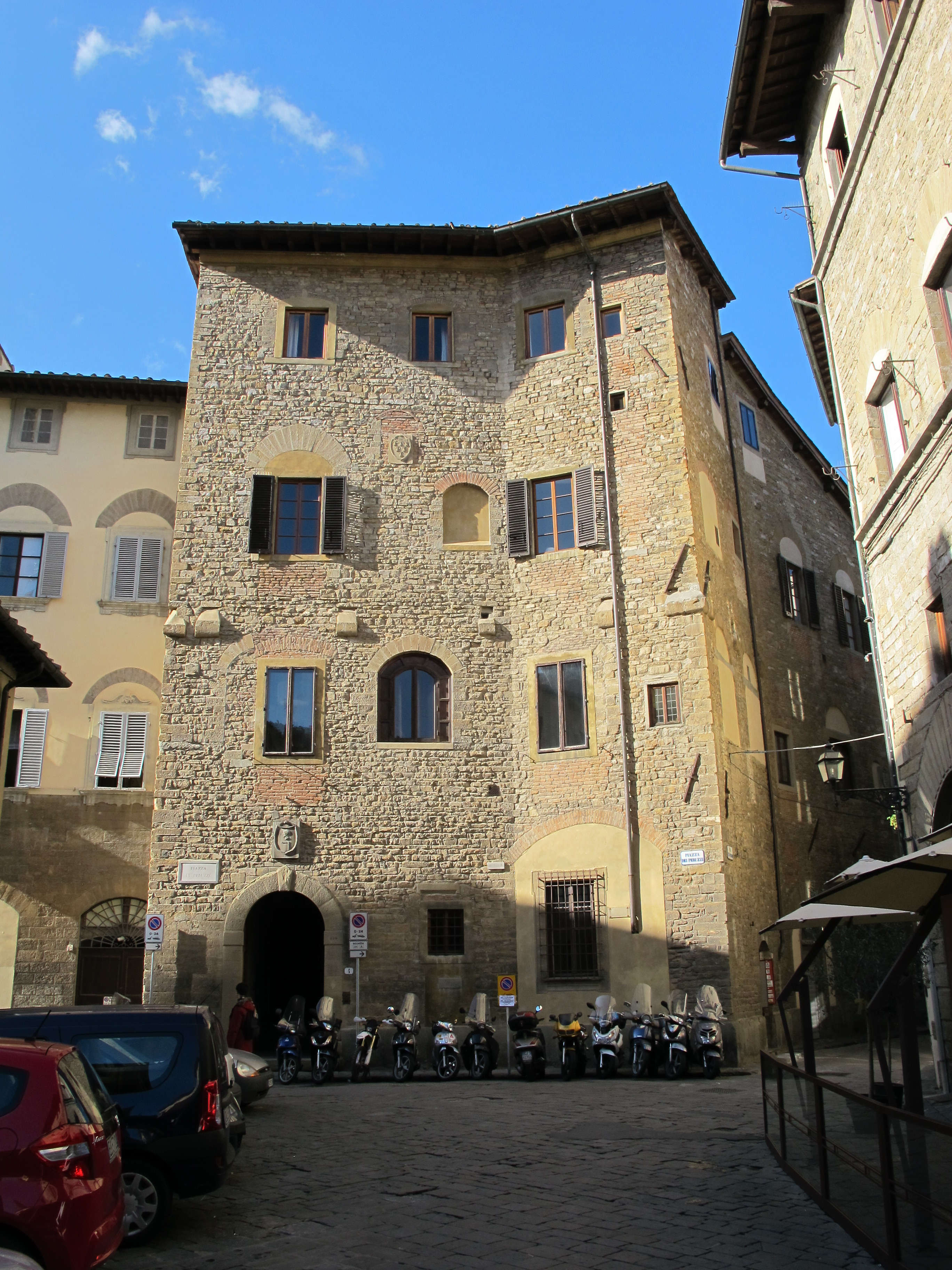 Firenze